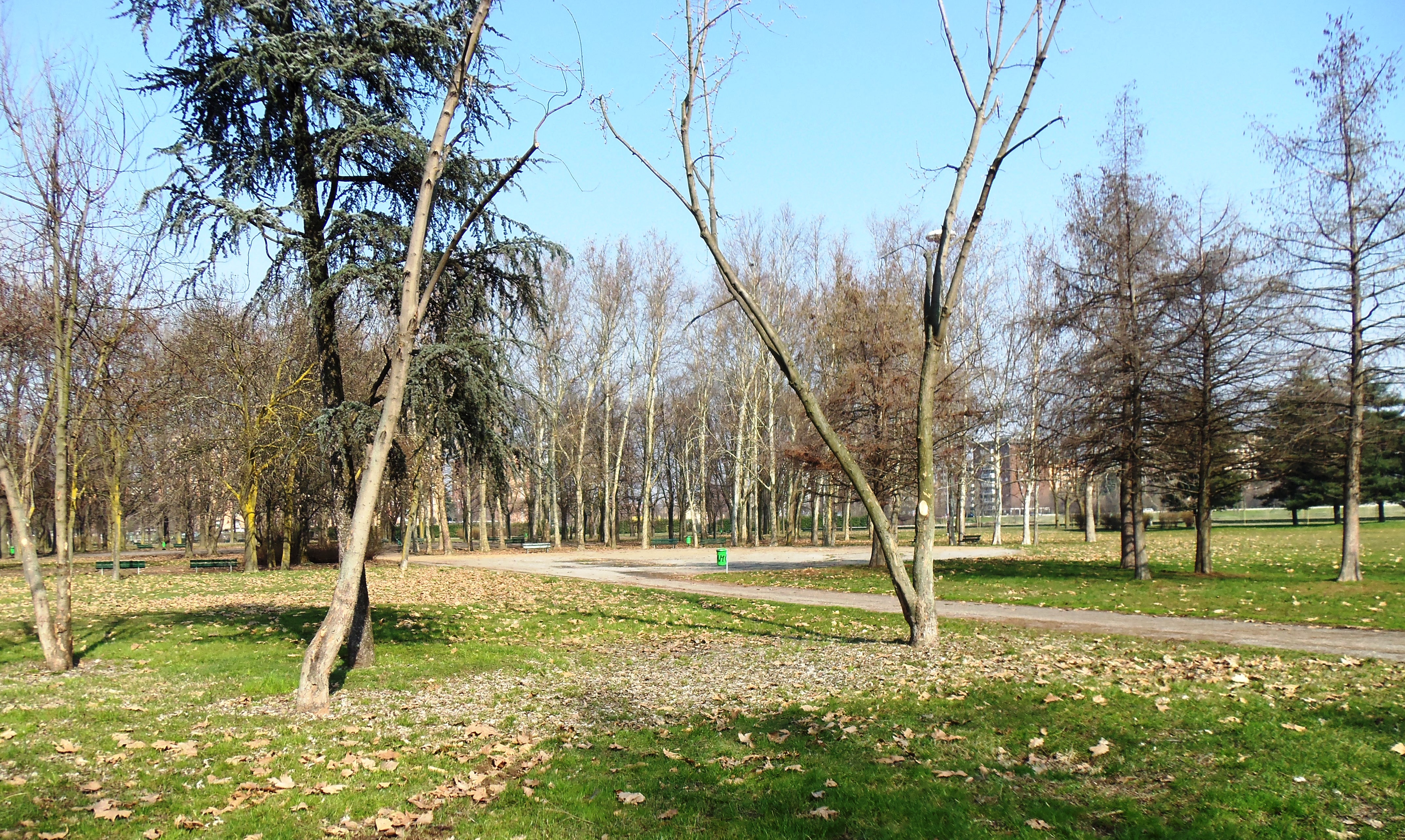 Milano, parco Andrea Campagna